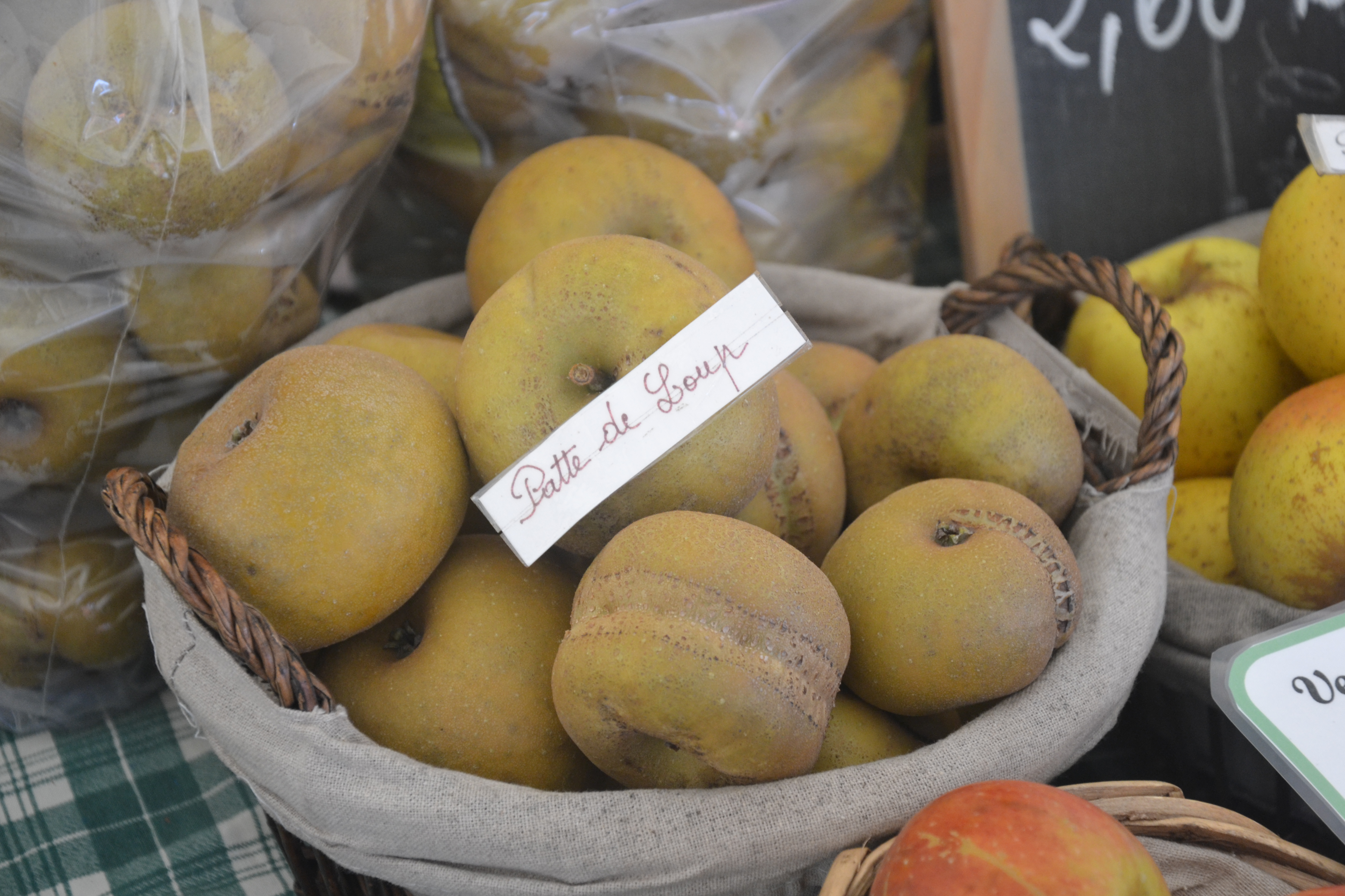 Pomme variété Patte de loup. Comme si un loup l'avait griffée.